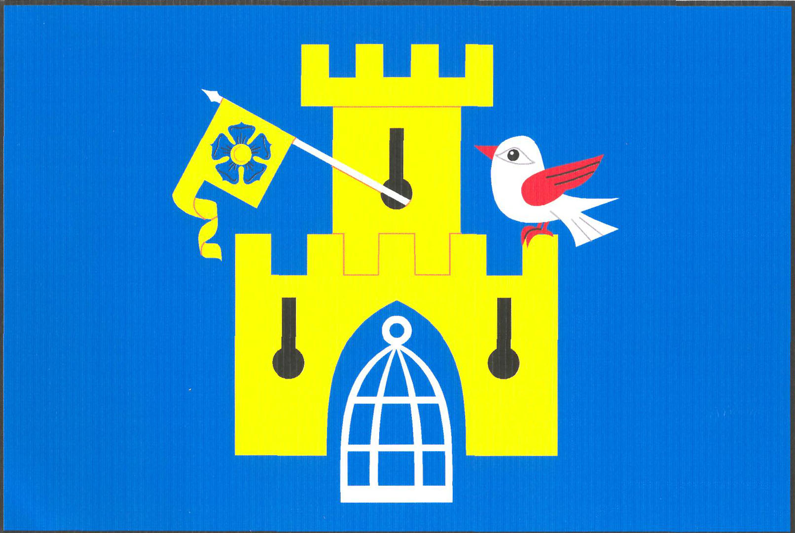 Vlajka obce Klec (okres Jindřichův Hradec)